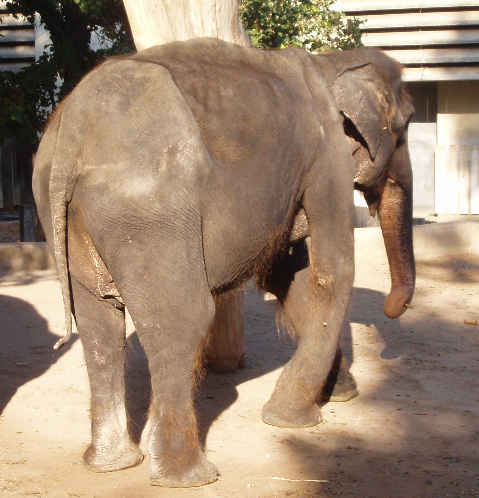 Elefantin Vilja, Oktober 2007